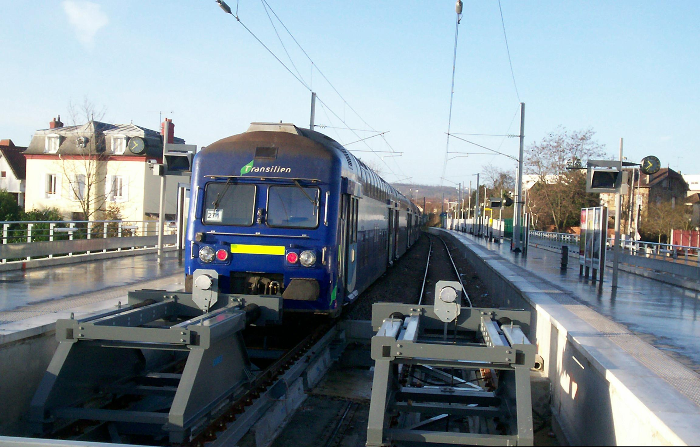 Rame VB2N Transilienne en gare terminale d'Ermont Eaubonne